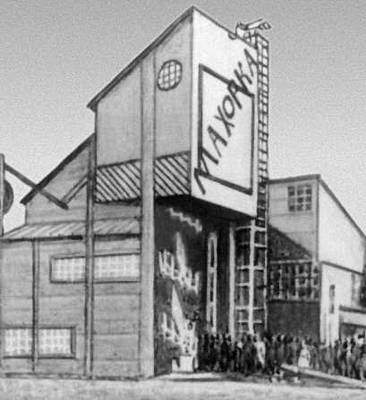 Павильон Махорка архитектора К.С. Мельникова